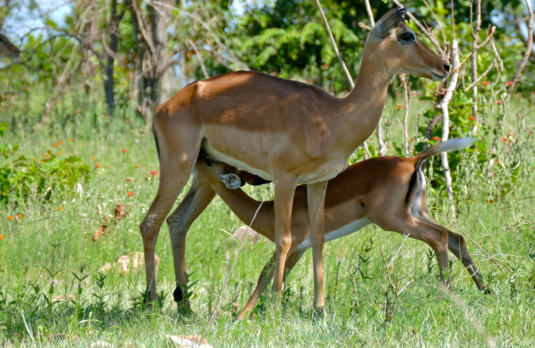 S110 Road North of Berg-en-Dal, Kruger NP, SOUTH AFRICA